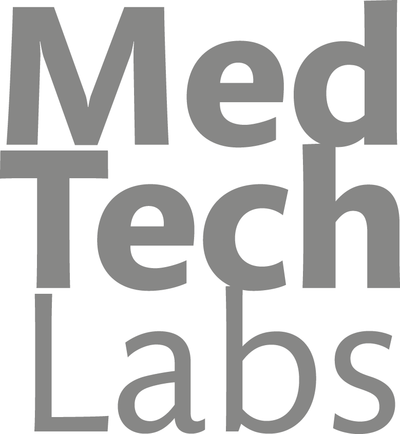 MedTechLabs logotyå